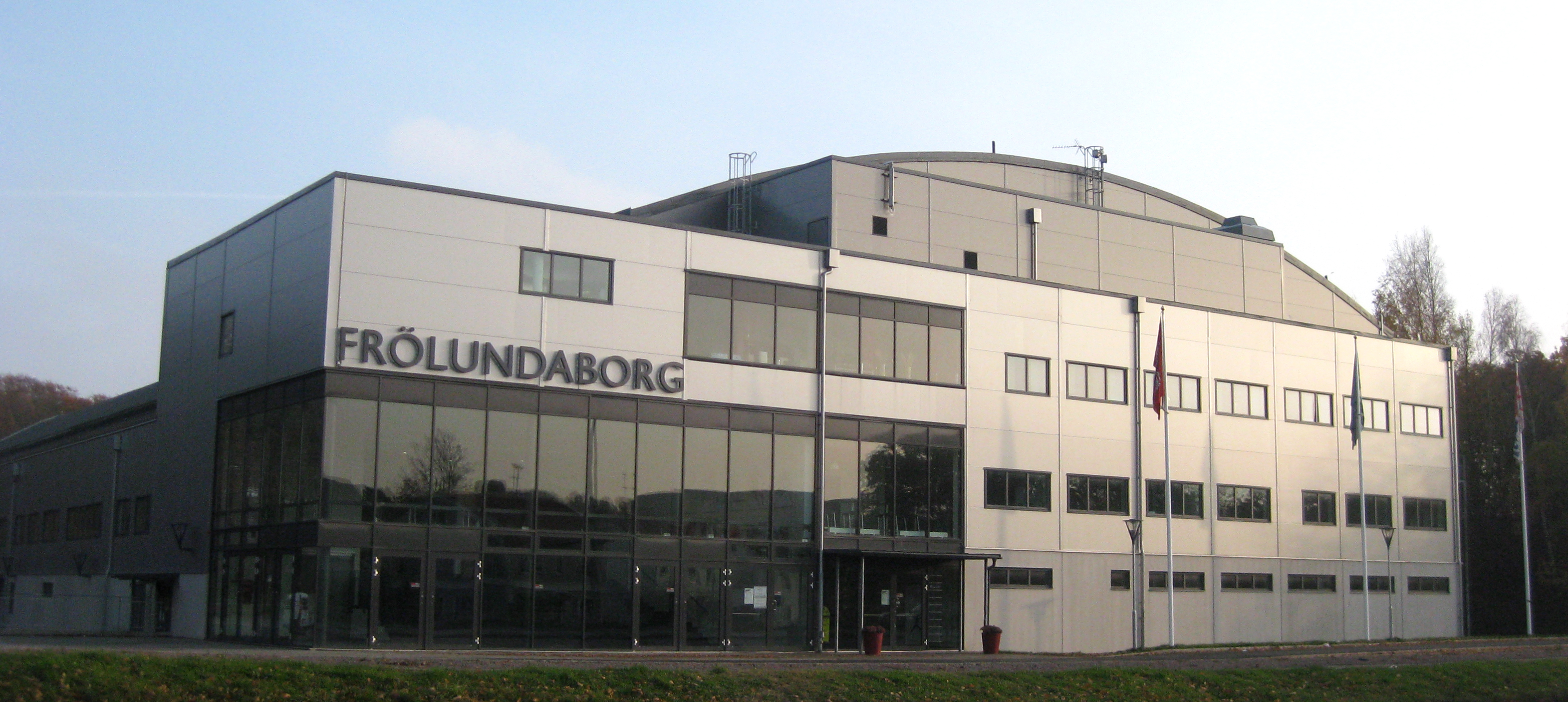 Exteriörbild på Frölundaborgs isstadion.